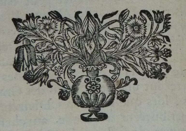 Livre Recueil d'Emblêmes ou tableau des sciences et des vertus morales par I. Baudoin, de l'académie françoise Tome I A Paris chez Jean Cochart, au cinquième pillier de la grande salle du Palais au S. Esprit. M. DC. LXXXV. Avec Privilege du Roy. Livre illustré par Marie Briot